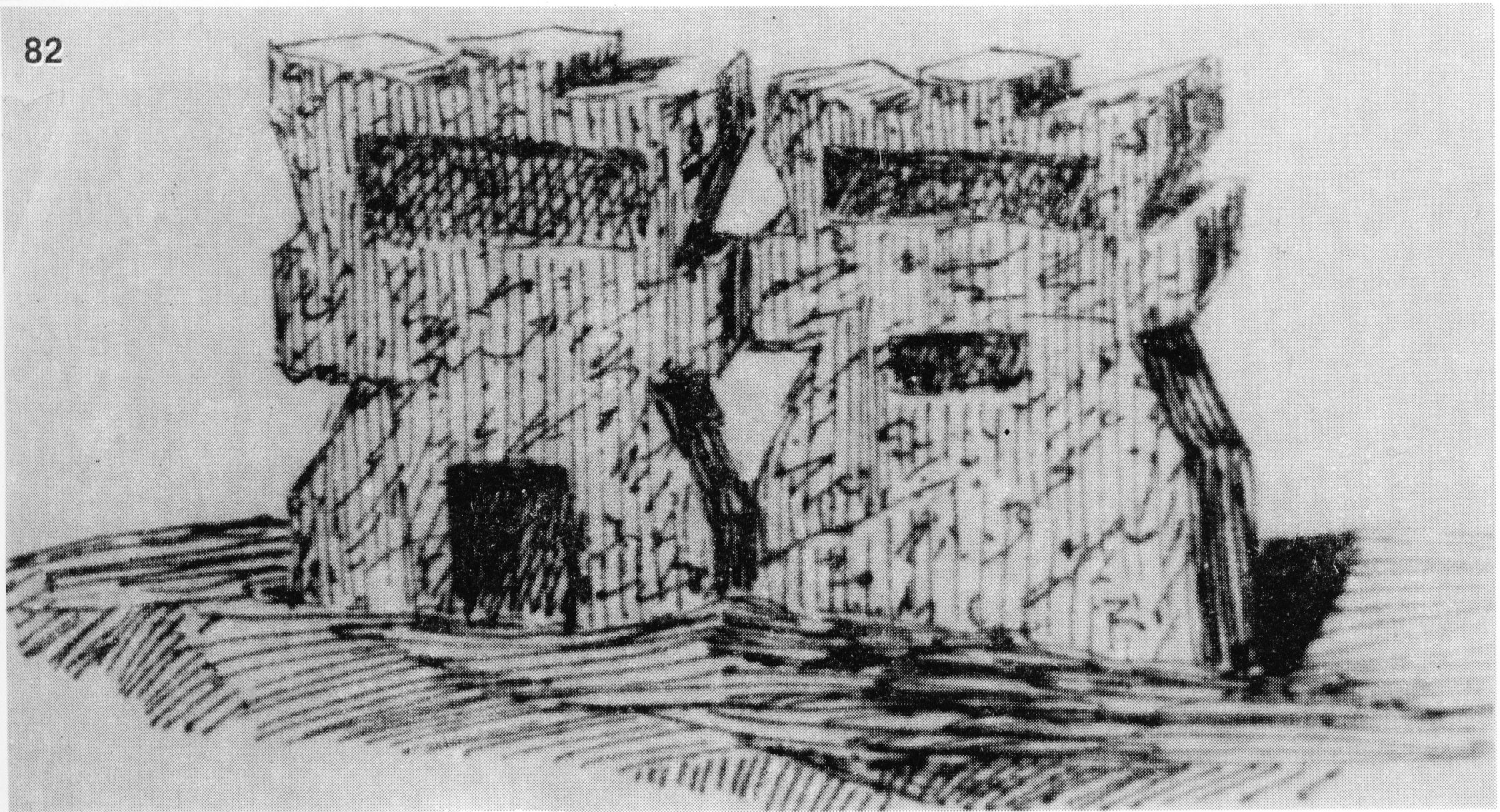 82. Група кръстове - надгробни паметници, из гробищата на с. Руска Бяла, Врачанско. По формата си са еднакви - над един гроб, в който са погребани двама братя. Издялани са грубо от варовит туф. Страничните им крила са малки и четвъртити; горните трапецовидни, с шапчици, мъжки. По лицата им са издълбани плитки ниши за свещи. Нови. Размери: 30x23x10 см. Скицирани на 27.IV.1917 г. (Т. 7, обр. 84.)